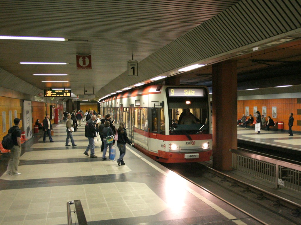 Niederflurlinie 9 in der unterirdischen Haltestelle Bf. Deutz